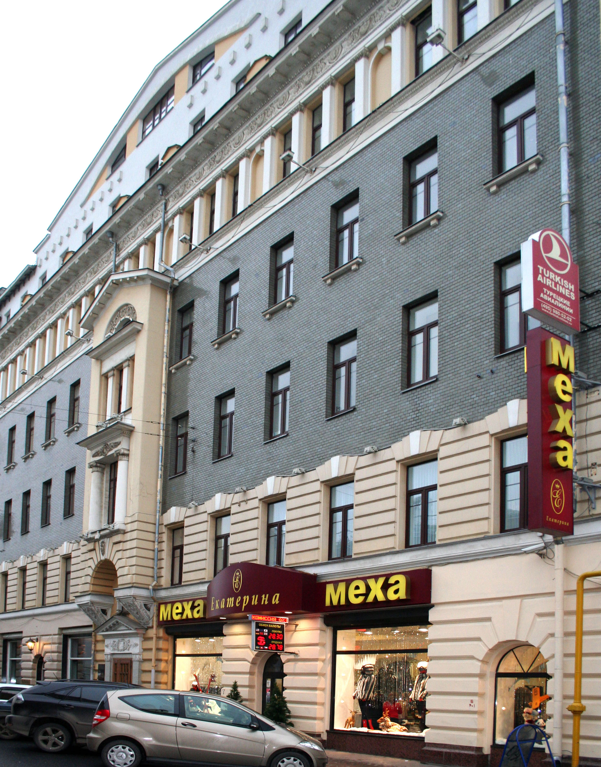 Камергерский 5/7 стр.2